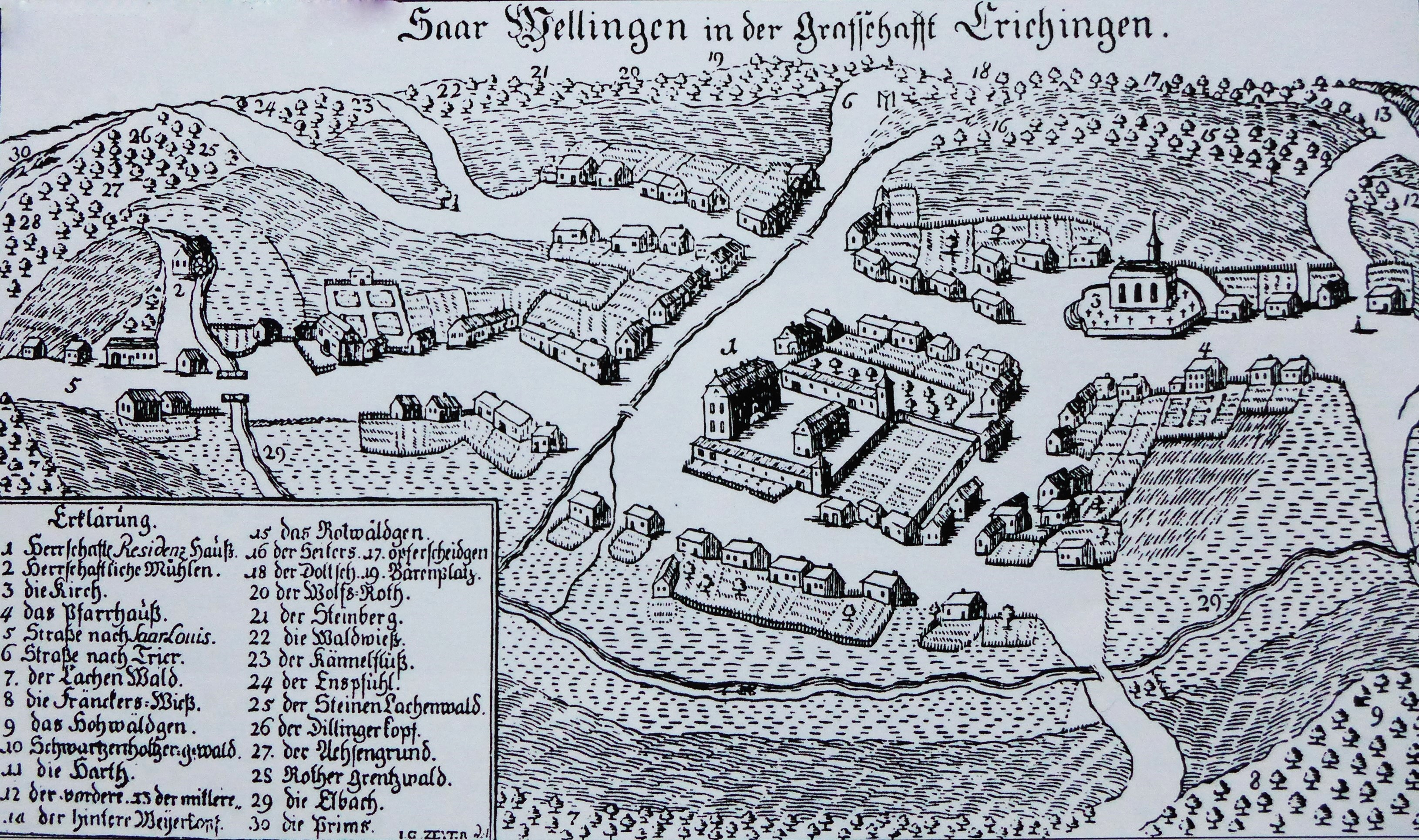 Saarwellingen im Jahr 1777, Gemeindearchiv Saarwellingen